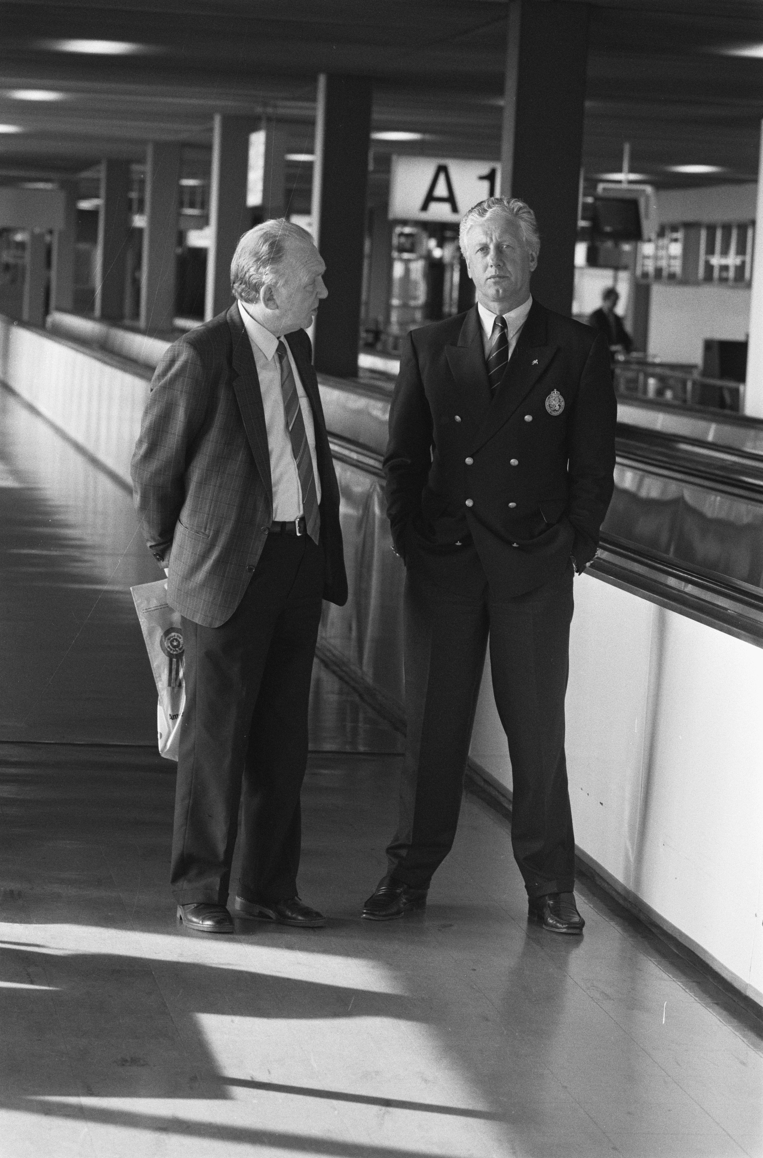 Collectie / Archief : Fotocollectie Anefo Reportage / Serie : [ onbekend ] Beschrijving : Bondscoach Thijs Libregts in gesprek met KNVB-voorzitter Jo van Marle op Schiphol bij vertrek van het Nederlands elftal naar Finland Datum : 29 mei 1989 Locatie : Noord-Holland, Schiphol Trefwoorden : elftallen, sport, trainers, vertrekken, voetbal Persoonsnaam : Libregts, Thijs, Marle, Jo van Instellingsnaam : Nederlands Elftal Fotograaf : Bogaerts, Rob / Anefo Auteursrechthebbende : Nationaal Archief Materiaalsoort : Negatief (zwart/wit) Nummer archiefinventaris : bekijk toegang 2.24.01.05 Bestanddeelnummer : 934-4616